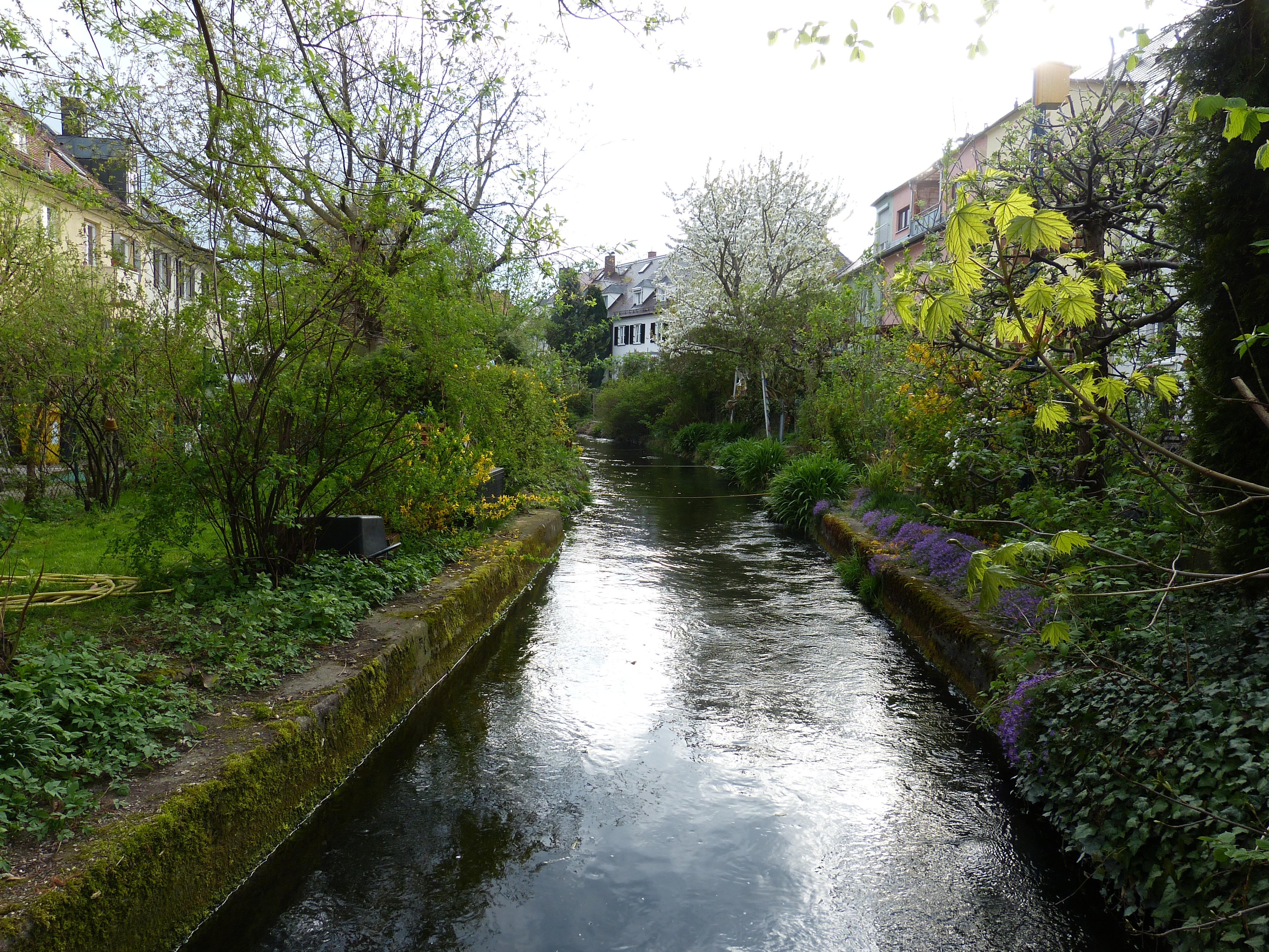 Der Mühlbach in Augsburg-Pfersee an der Eberlestraße.